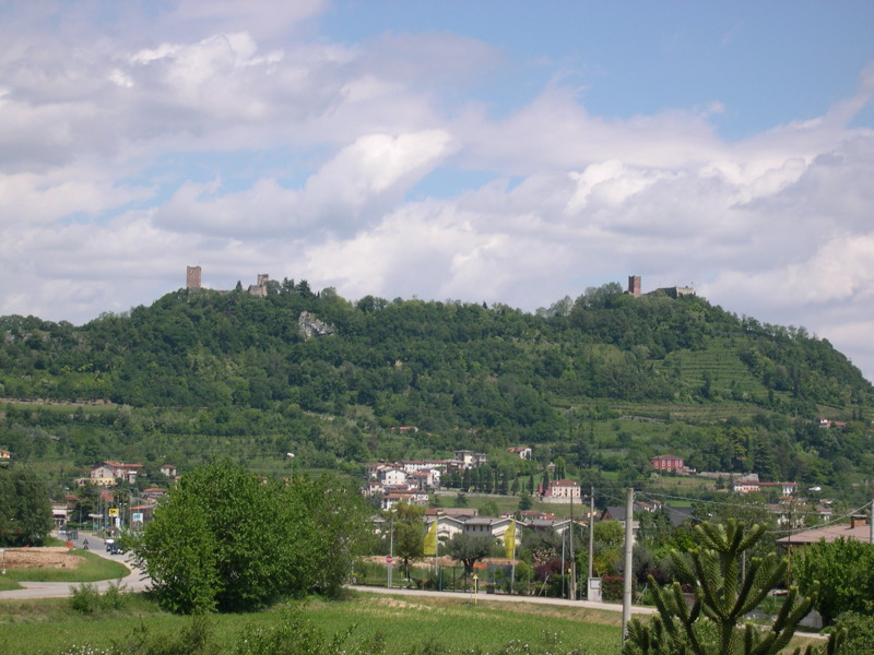 Castelli di Giulietta e Romeo in Montecchio Maggiore (VI), (Filippo Mazzaia, maggio 2004)